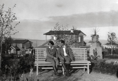 De fotograaf Kurt Lubinski zit met zijn vrouw Margot op een bankje in het Siberische kuuroord Schira. Rusland, Siberië, datum onbekend. (wrsh. 1928)